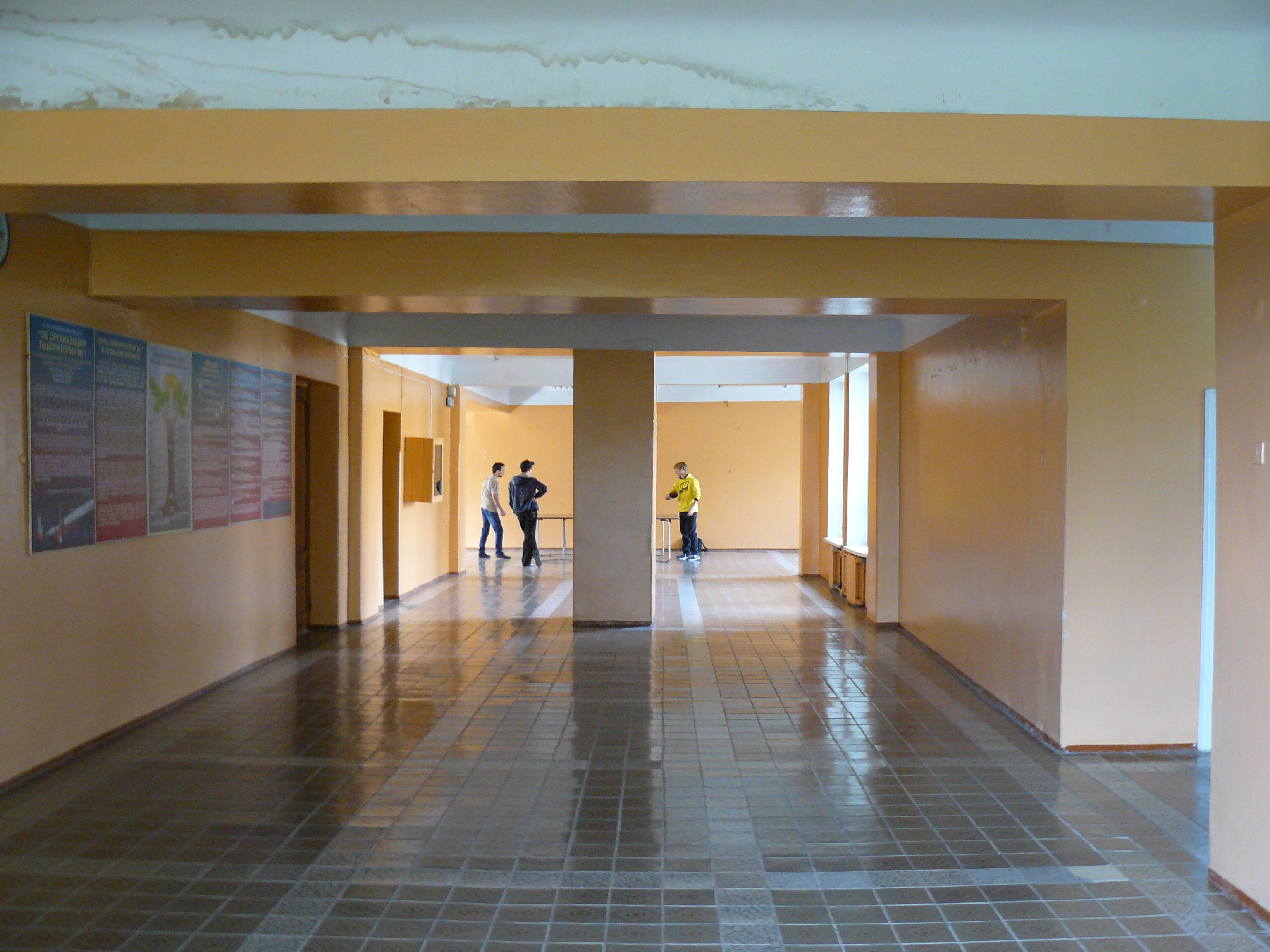 Физико-технический факультет ХНУ. Игра в теннис в коридоре на большой перемене